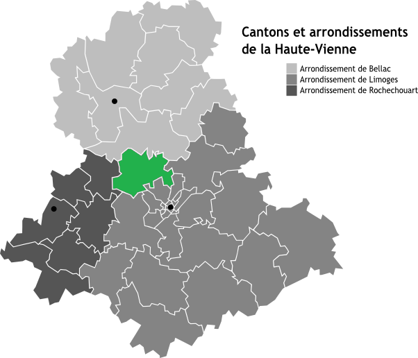 Canton de Nieul, Limousin, France en Carte des arrondissements de la Haute-Vienne